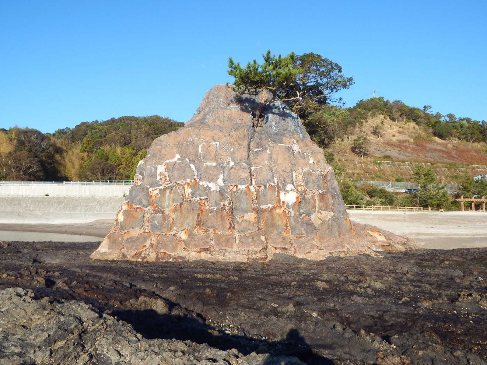 大砂海岸の法生島